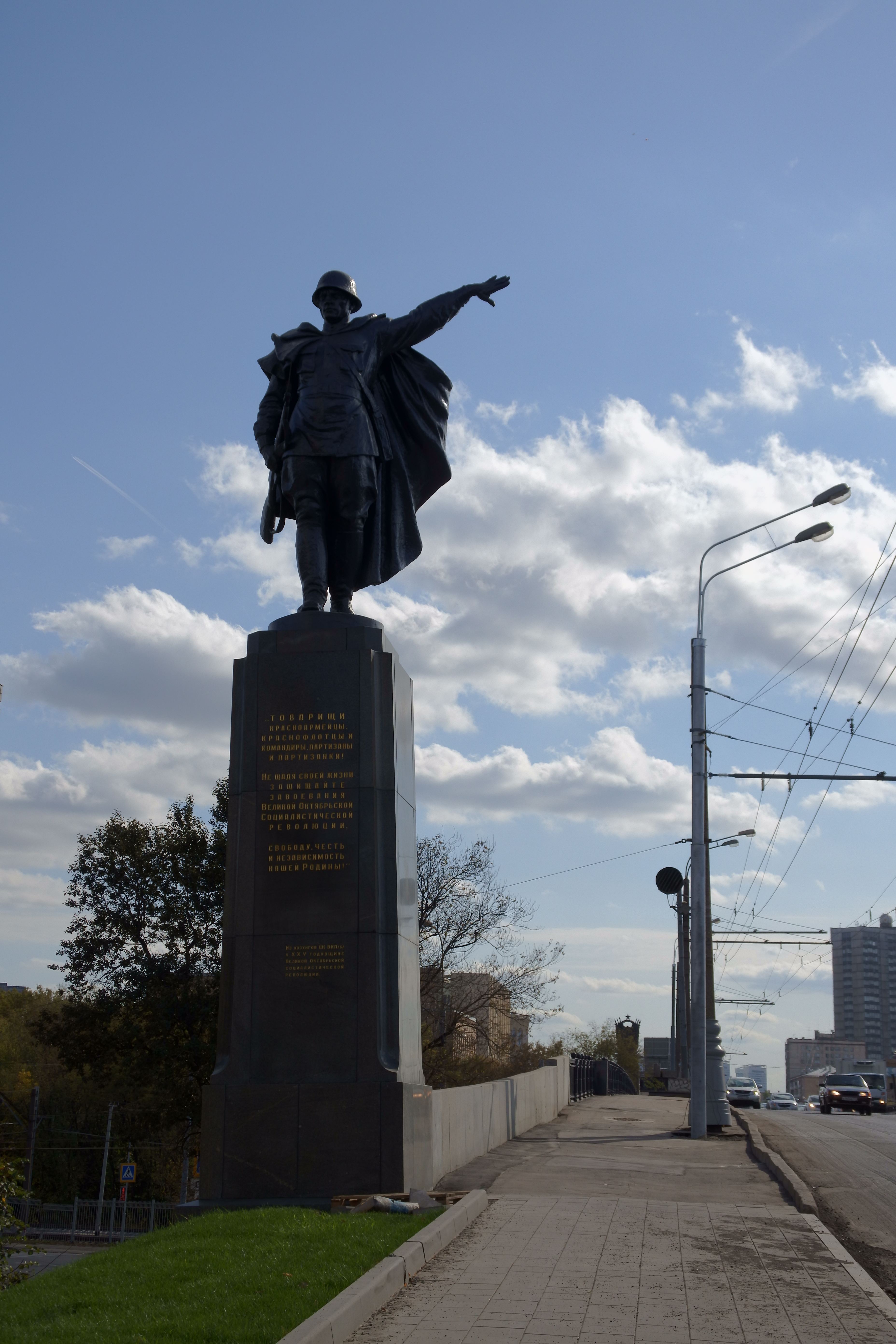 Статуя воина: Ленинградское шоссе, Войковский, Северный округ, Москва